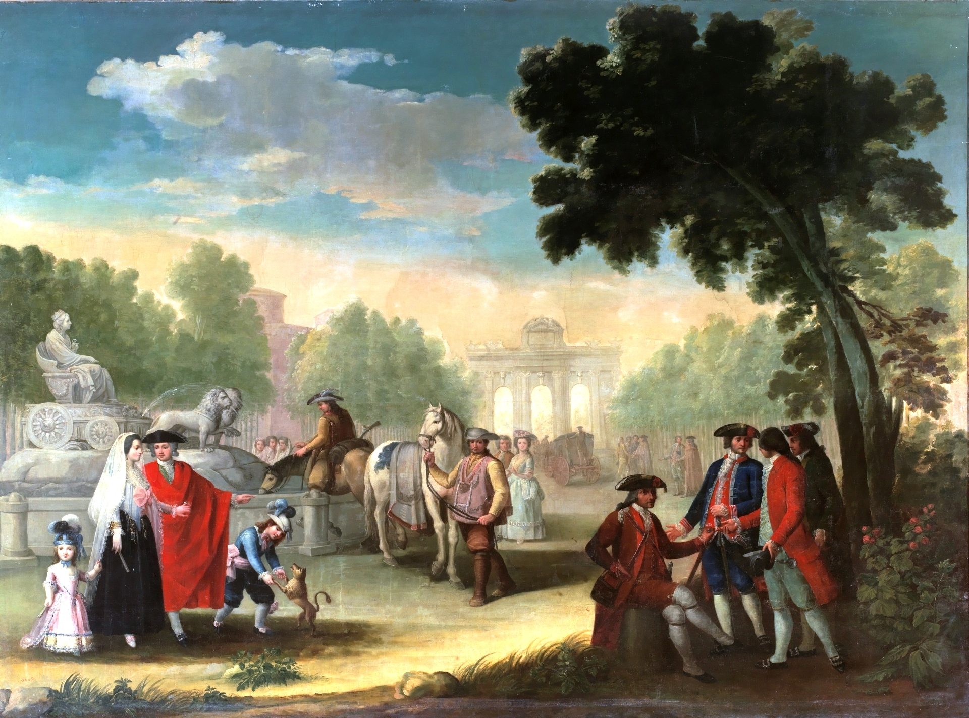 La obra representa la Puerta de Alcalá de la ciudad de Madrid vista desde la Fuente de Cibeles.